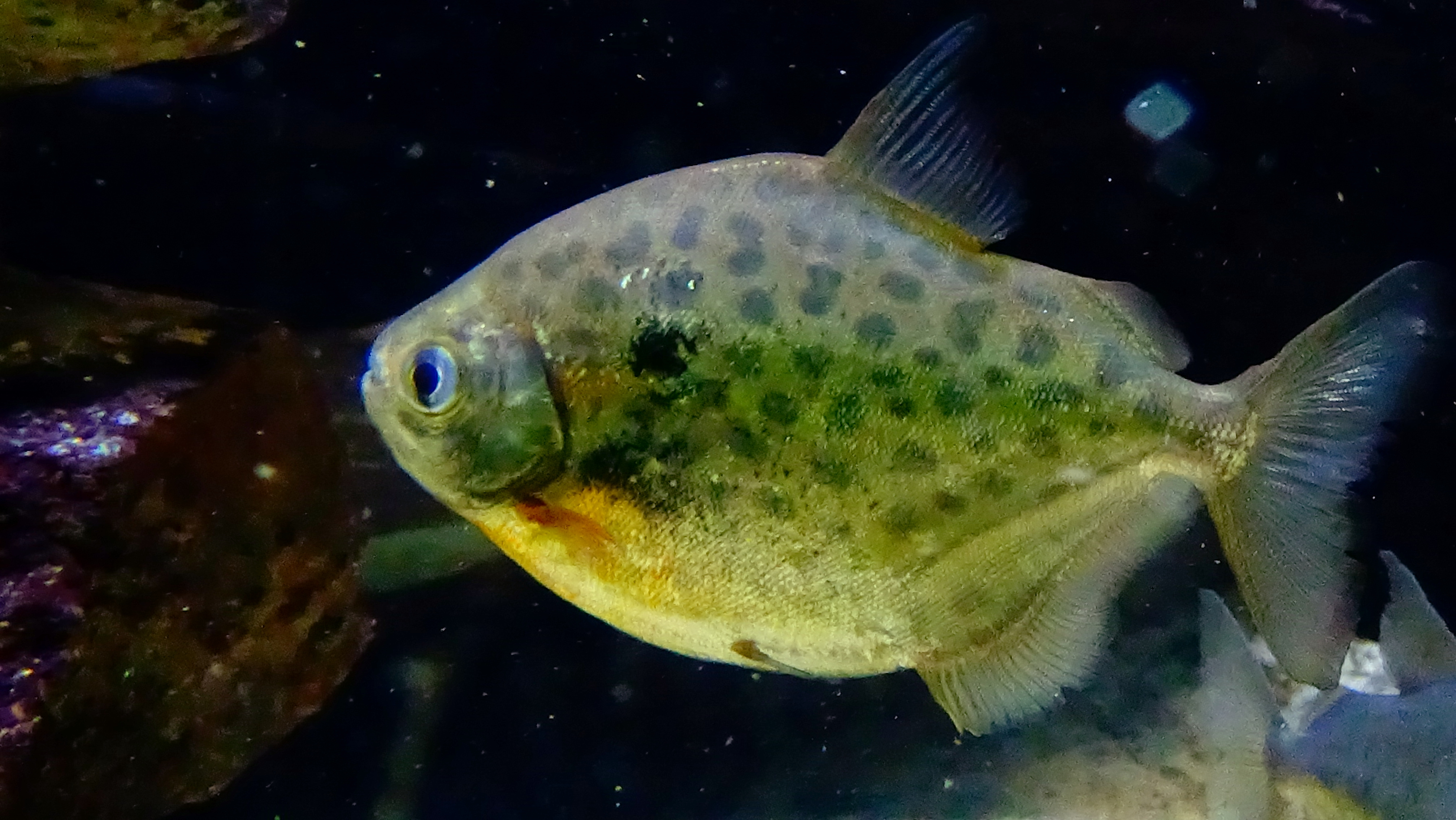 Metynnis lippincottianus - Aquarium du palais de la Porte Dorée - Paris/France - 07/06/2015